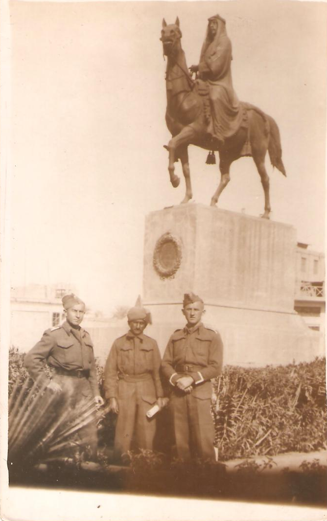 Zdjęcie z albumu rodzinnego